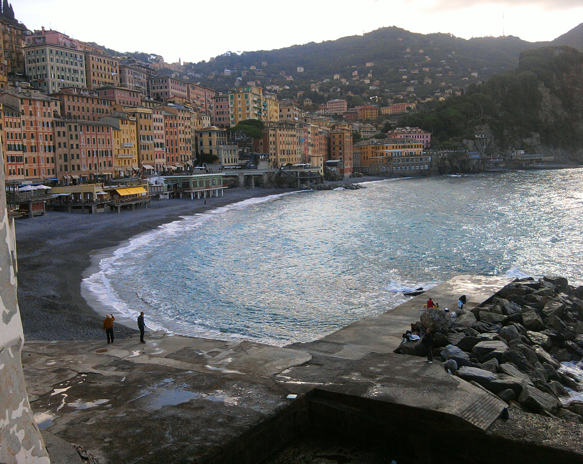 Immagine della costa di Camogli.